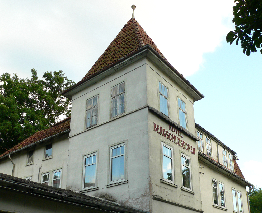 Bergschlößchen mit Turm